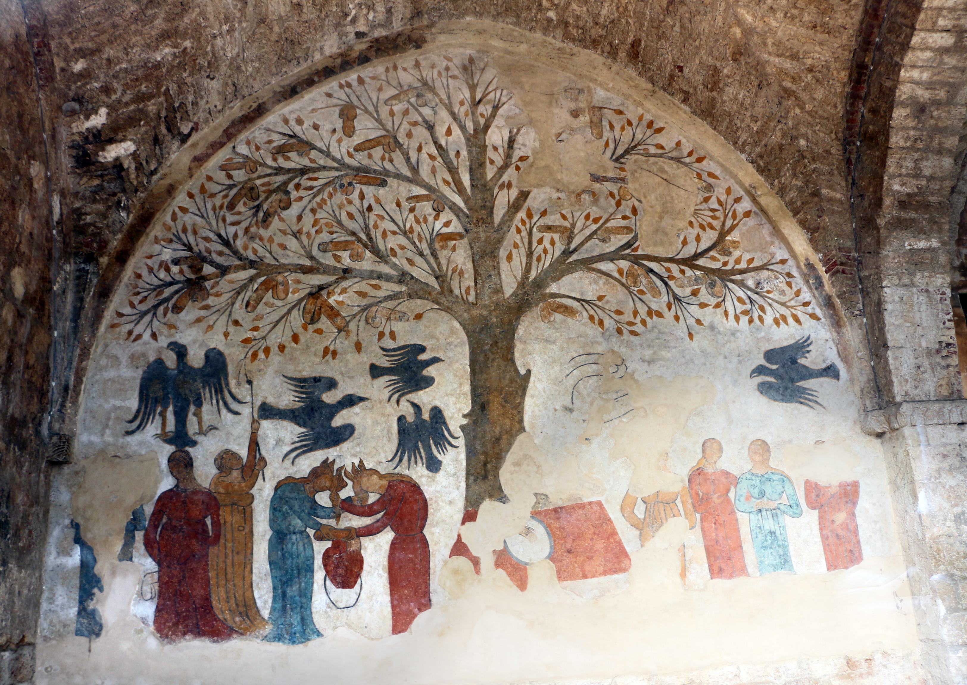 Affresco della Fecondità (fonte pubblica) This is a photo of a monument which is part of cultural heritage of Italy.